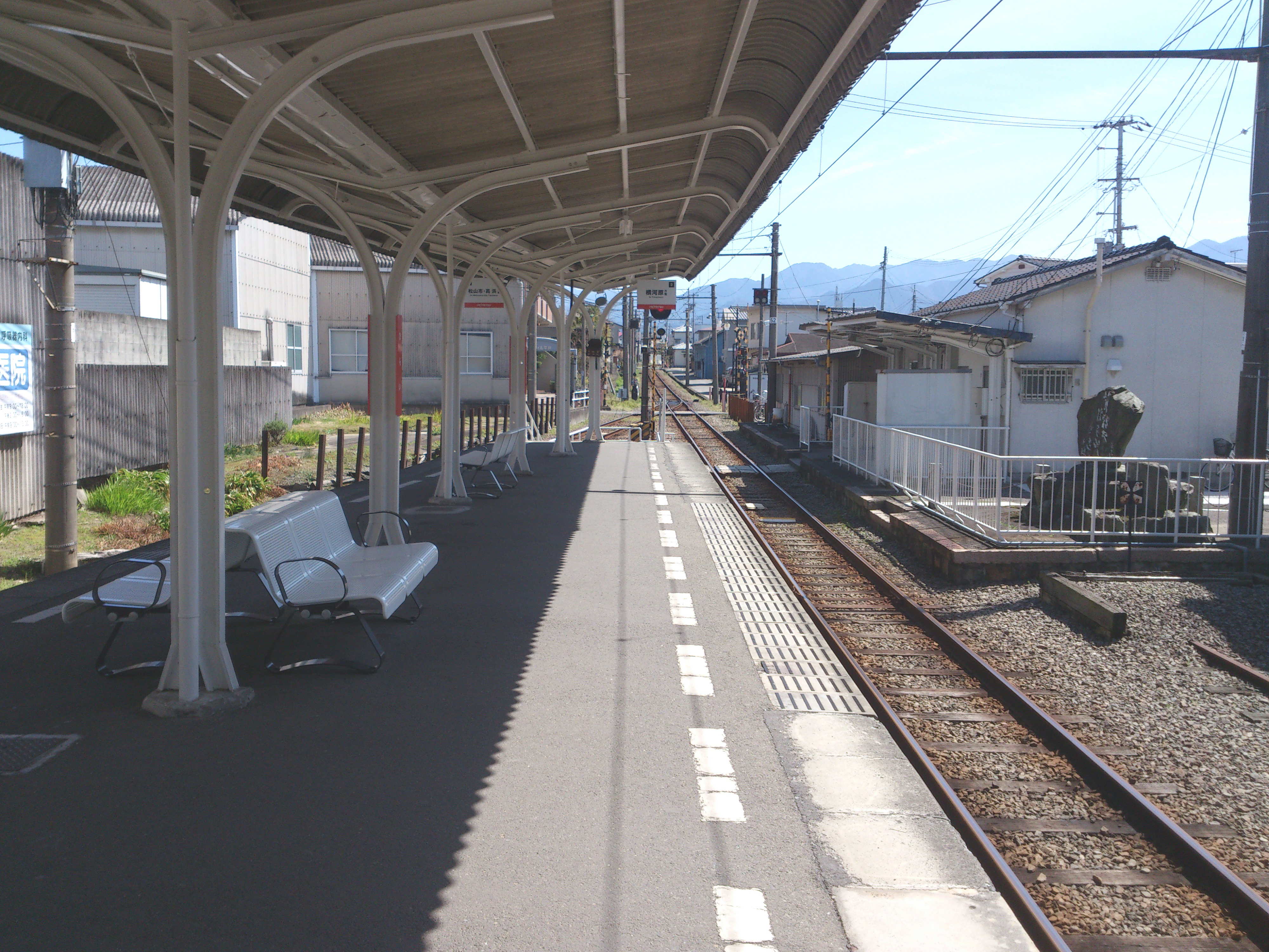 伊予鉄道、平井駅のホームです。